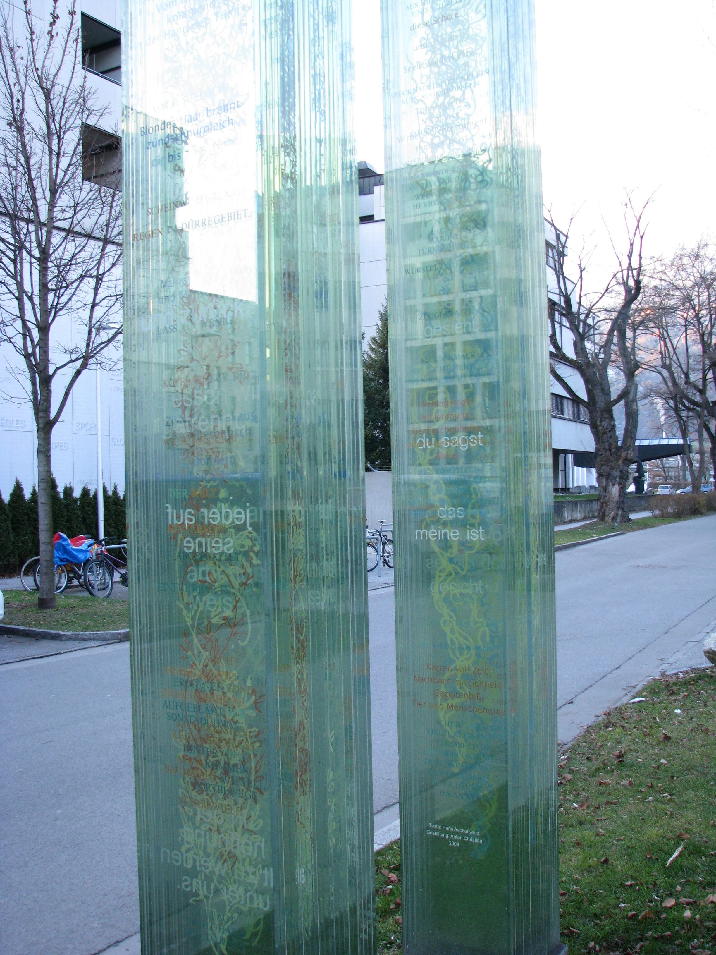 Säulen der Poesie an der General-Eccher-Straße in der Innsbrucker Reichenau von Anton Christian, 2009